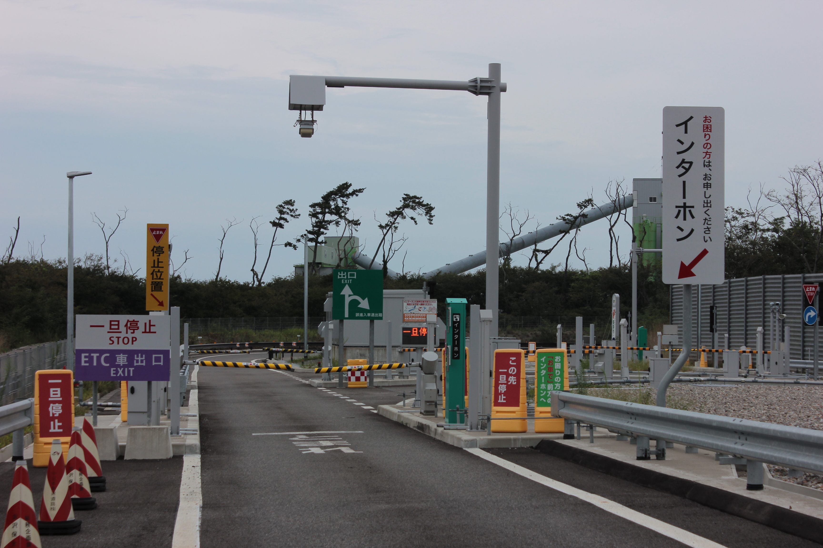 能美根上スマートインターチェンジ出口 Canon EOS Kiss X5